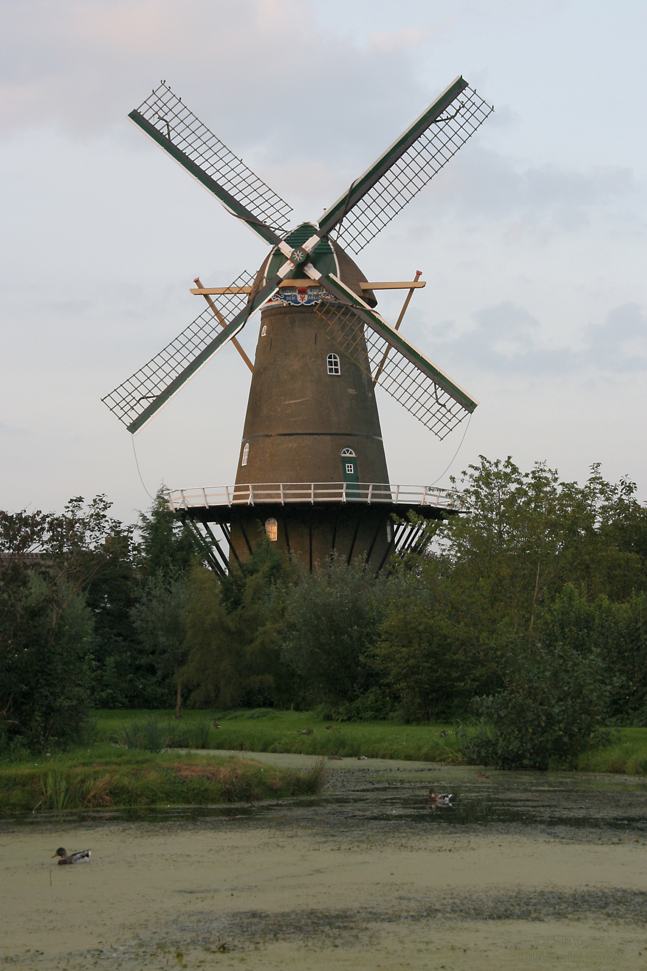 Bergambacht: Molen Den Arend